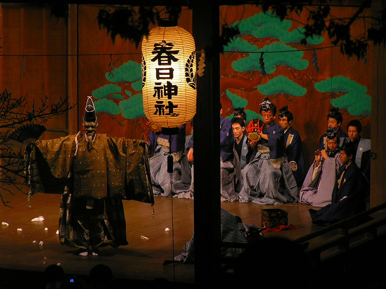 春日神社（かすがじんじゃ）は、篠山市黒岡75にある神社。奈良の春日大社から分霊された。 目次 [非表示] 1 概要 2 歴史 3 社殿 4 文化財 5 年間行事 6 交通アクセス 7 関連項目 8 外部リンク [編集] 概要 奈良の春日大社の分祠を祭り、地元では「おかすがさん」と呼ばれる氏神。能楽殿で演じられる春の春日能と秋の祭礼（10月第3土・日）の京都八坂の祇園祭を模したといわれる4基の神輿、華麗な飾り付けを施された9基の山鉾巡行は京文化を強くうかがわせ、笛や鐘の囃子を響かせながら小京都雰囲気の残るの古い町並みを練り歩く様子は、近代的な町で行われる本場の京都の祇園祭よりも情緒あるものとして知られる。 [編集] 歴史 平安時代初期の876年（貞観18年）当時、日置荘を領有者であった藤原基経、藤原時平父子により藤原氏の氏神である春日大社（奈良県）より分詞し黒岡村南部の当時は笹山と呼ばれた現在は篠山城のある小山に勧請し、祀り氏神としたのが起源とされる。後の1609年（慶長14年）、篠山城築城の際に現在の地に遷された。 秋の祭礼に使われる4柱の神霊を移した金神興は、2基を黒岡村より元禄7年6月に、他の2基は安永8年9月（元禄13年の説もある）篠山町より寄進されたもの。9台のちんちき山と呼ばれる山鉾は寛文3年以降に各町内より寄進されたもので、京都の祇園の山鉾を模し造られており、絢爛豪華である。明治後期までは鳳凰・孔雀・蘇鉄・猩猩等の鉾をつけ巡行したが、電線が障害となり現在は鉾を付けずに巡行される。また太鼓御興は、交化交政に、王地山焼の陶工たちが担ぎ始めたのが始まりと伝えられる。 鉾山 長さ6m、高さ約5m、屋根までの高さは京都祇園祭・山鉾の約三分の二ほどの規模ながら京都の祇園祭に強い影響を受けている。初期の鉾山は現在よりも小形で簡素なものだったが、江戸時代中期頃に現在の規模となり華麗さを増した。初めて鉾山が作られたのは1663年（寛文3年）の三笠山 （上河原町）と伝えられる。篠山市指定文化財。 上町4台 三笠山（上河原町）、鳳凰山（下河原町）、孔雀山（上立町）、高砂山（下立町） 下町5台 剣鉾山（呉服町）、猩々山（上二階町）、諫鼓山（下二階町）、蘇鉄山（魚屋町）、鏡山（西町） 神輿 1694年（元禄７年）および1779年（安永8年）に寄進奉納されたが、4基あるのは春日神社の4祭神にちなんだもので、4祭神とは天児屋根命（あまのこやねのみこと）、武甕槌命（たけみかつちのみこと）と経津主命（ふつぬしのみこと）比売神（ひめのおおかみ）である。 [編集] 社殿 本殿 能楽殿 篠山藩主13代藩主青山忠良によって江戸時代末期である1861年（文久元年）に建てられた能舞台。建築は稲山嘉七、永井理兵衛、舞台背景に描かれた松の絵は松岡曾右衛門によるもので、当時箱根以西において最も立派なものであると称えられた。正月の1月1日には、翁奉納および毎年、桜の咲く時期の4月上旬に「篠山春日能」が催される。2003年（平成15年）には国の重要文化財に指定される。 絵馬堂 1952年（昭和27年）8月に平和記念に建立された。内部の馬絵は、当初は旧拝殿内に会ったものだが慶安2年に松平忠国が奉納した狩野尚信作の黒神馬は、精緻なもので価値が高い。この絵馬だけには金網が張ってあったが、それはこの馬が夜な夜な絵から抜け出しては黒岡の田畑の豆を食い荒らしたという伝説があるためである。多紀名宝にも指定されている。 [編集] 文化財 重要文化財 能楽殿 [編集] 年間行事 1月1日 翁奉納。午前0時過ぎより行われる。 4月上旬 春日能。 10月第3土・日 秋の祭礼。 [編集] 交通アクセス 鉄道:JR福知山線「篠山口駅」 バス:神姫バス「春日神社前」より徒歩すぐ。 [編集] 関連項目 天児屋根命 武甕槌命 経津主命 比売神 春日神 [編集] 外部リンク 丹波篠山観光協会 公式サイト 春日神社地図 2007年第34回春日能（兵庫県篠山市教育委員会地域文化課 ） " より作成 カテゴリ: 兵庫県の神社 | 春日神社 | 篠山市